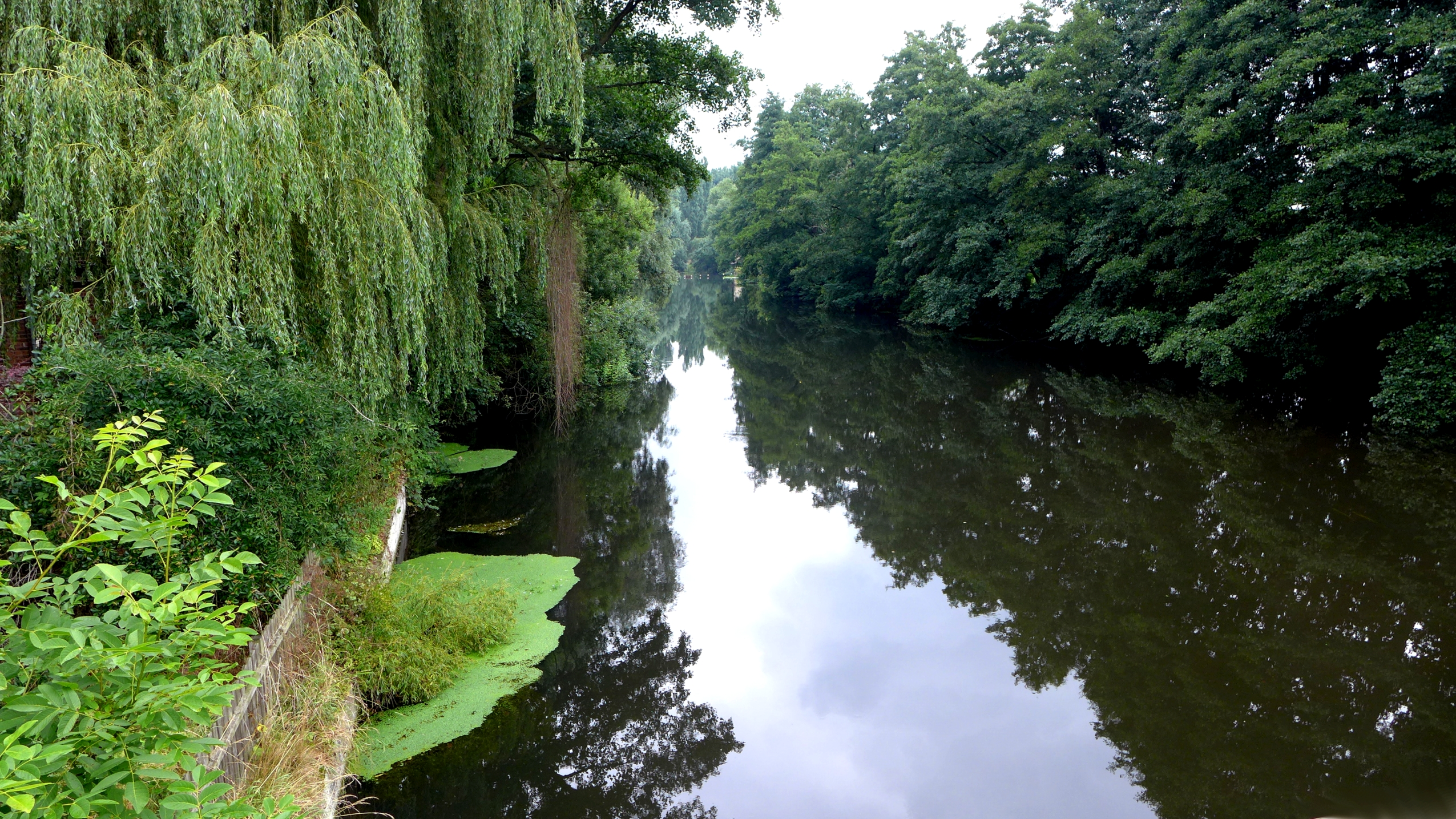 Die Ilmenau im Stadtgebiet der Hansestadt Uelzen im Bereich der Birkenallee. Aufnahmedatum 2016-08.